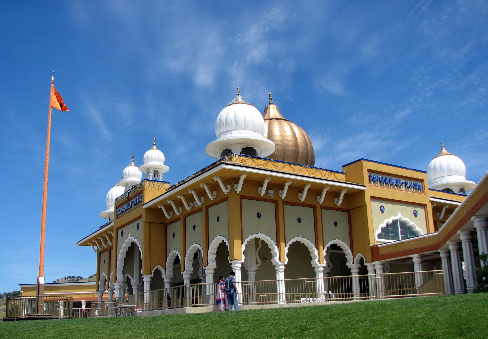 San Jose Gurdwara Sahib